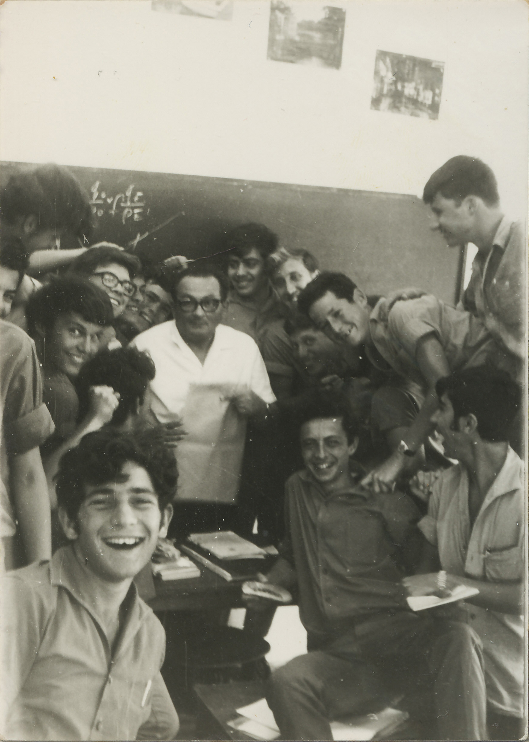 Bosmat - with Physics teacher Paldi, Class11, 1970